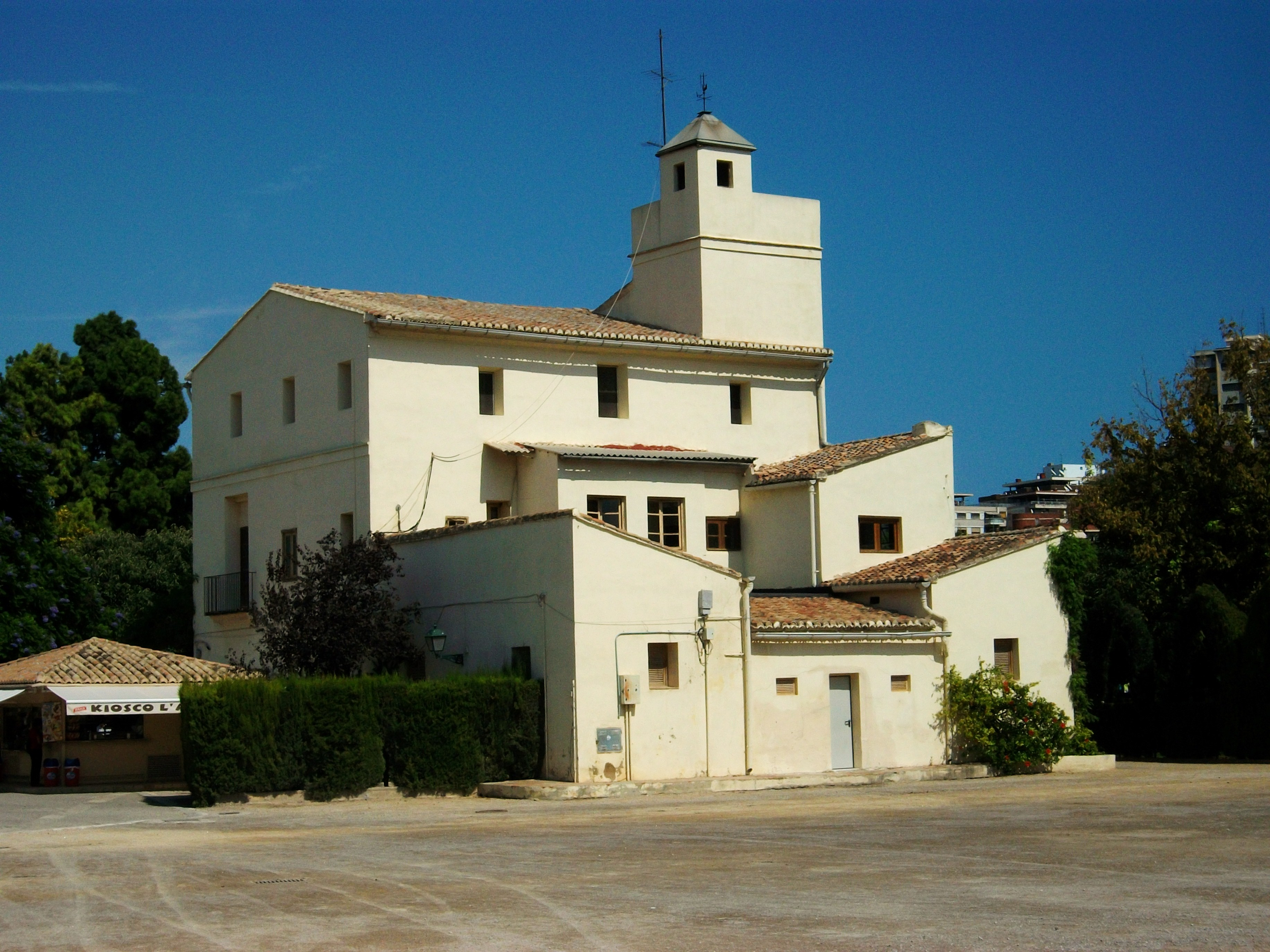 Alqueria de Canet als jardins del Real o de Vivers de València.